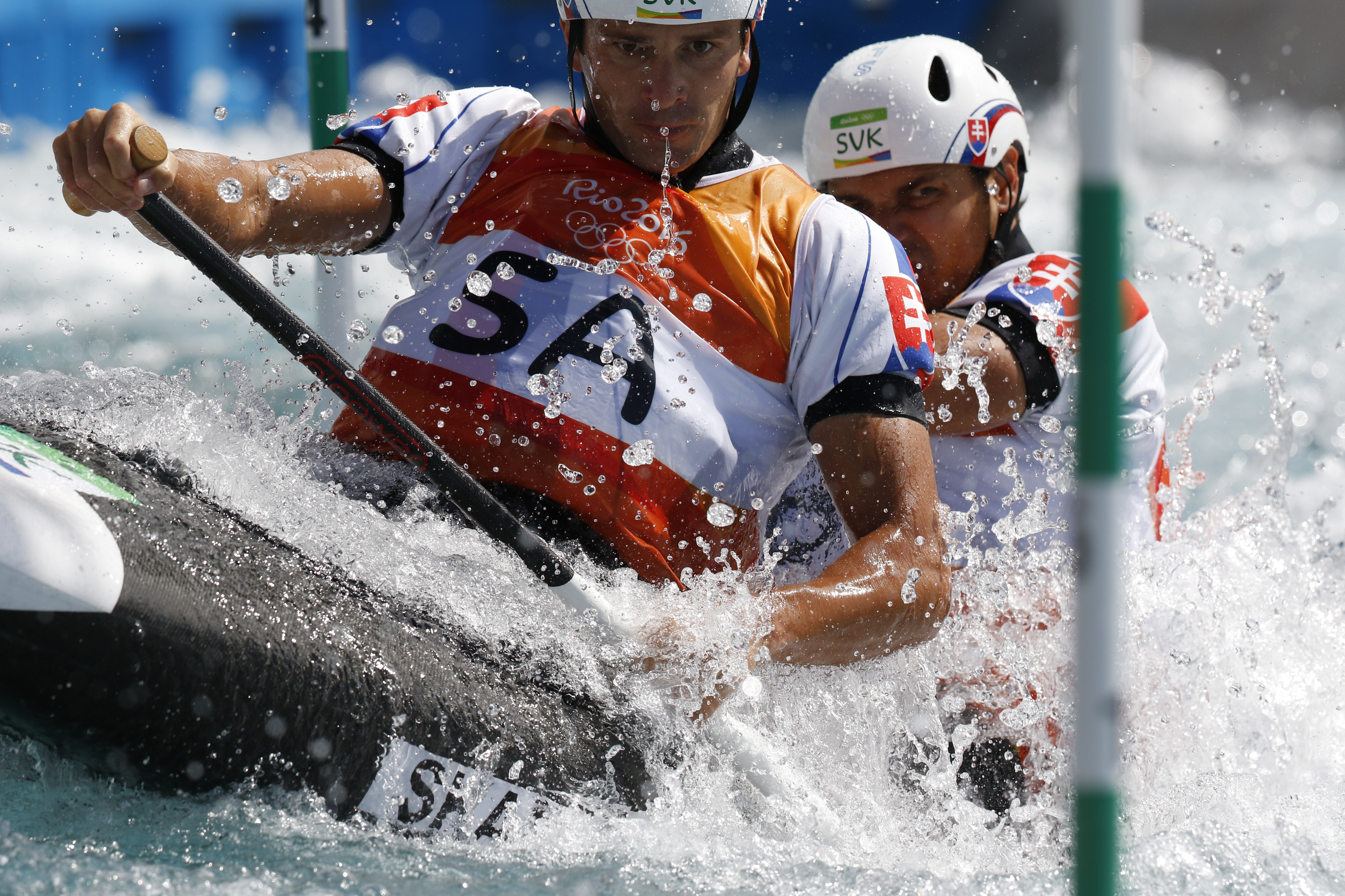 Rio de Janeiro - Irmãos eslovacos Ladislav Skantar e Peter Skanter levam medalha de ouro na canoagem slalom categoria C2 nos Jogos Olímpicos Rio 2016 no X Park em Deodoro (Fernando Frazão/Agência Brasil)